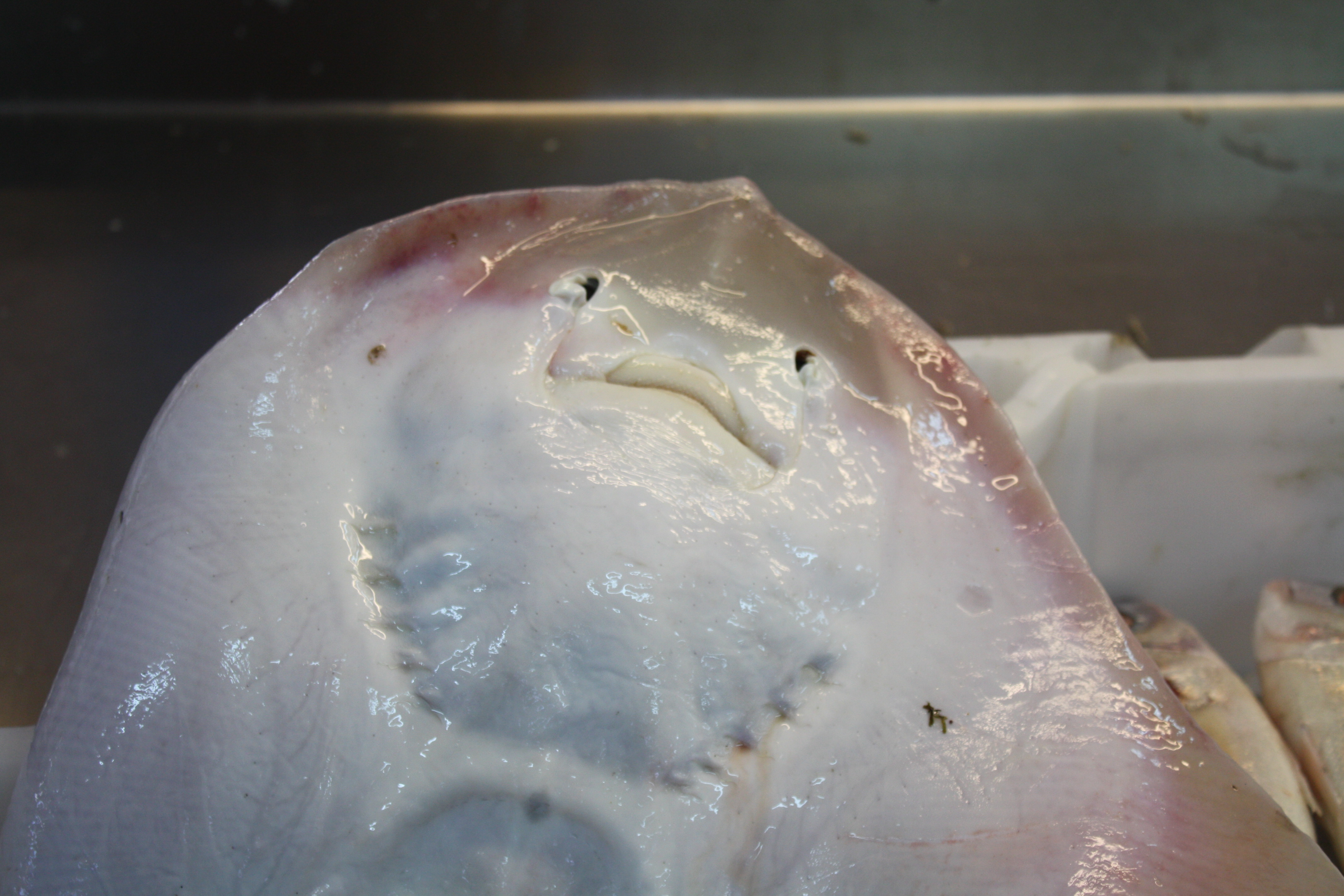 Cara inferior de la cabeza de una raya, en el mercado de O Grove (Pontevedra, España). Nótense las 5 aberturas branquiales.